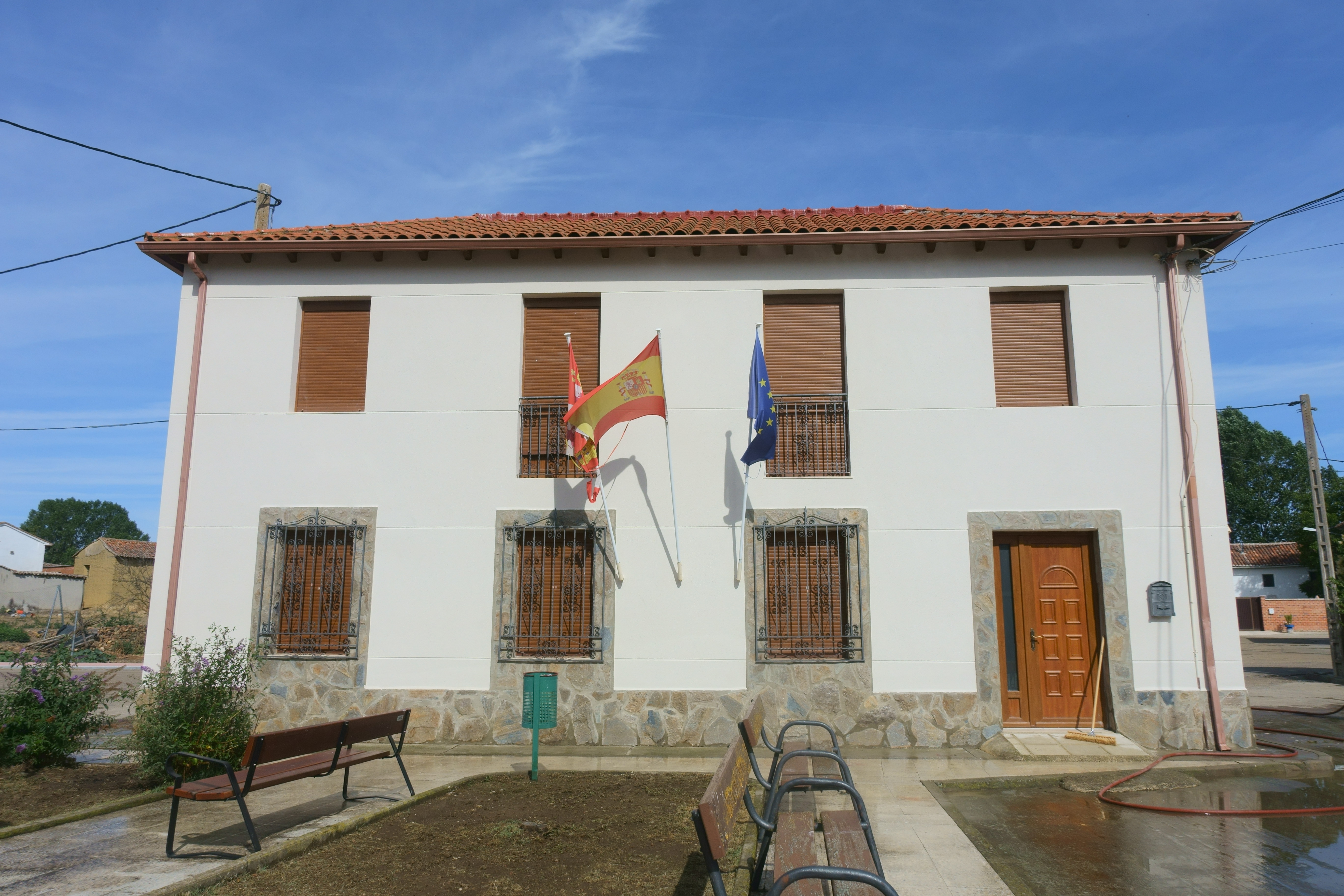 Casa consistorial de Pedrosa de la Vega (Palencia, España).